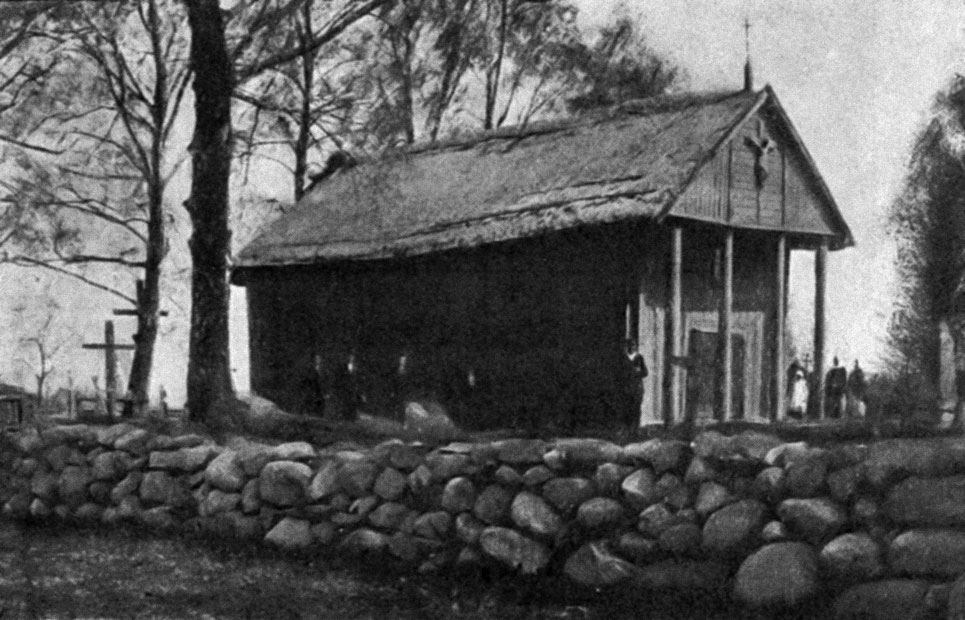 Беларуская (тарашкевіца): Новая Мыш (Novaja Myš). Капліца на могілках